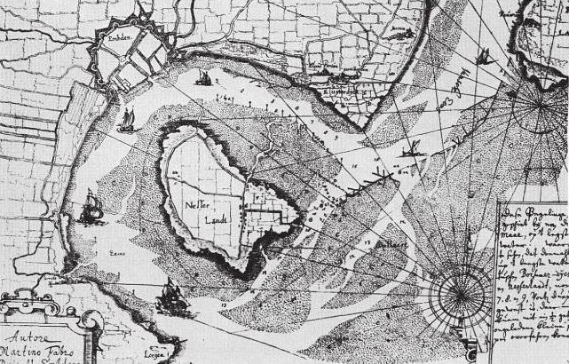 Uitsnede van de kaart 'Afbeelding van 't Nesserlander Hooft' van Martin Faber uit het verzamelwerk 'Trifoleum Aureum' (1648)